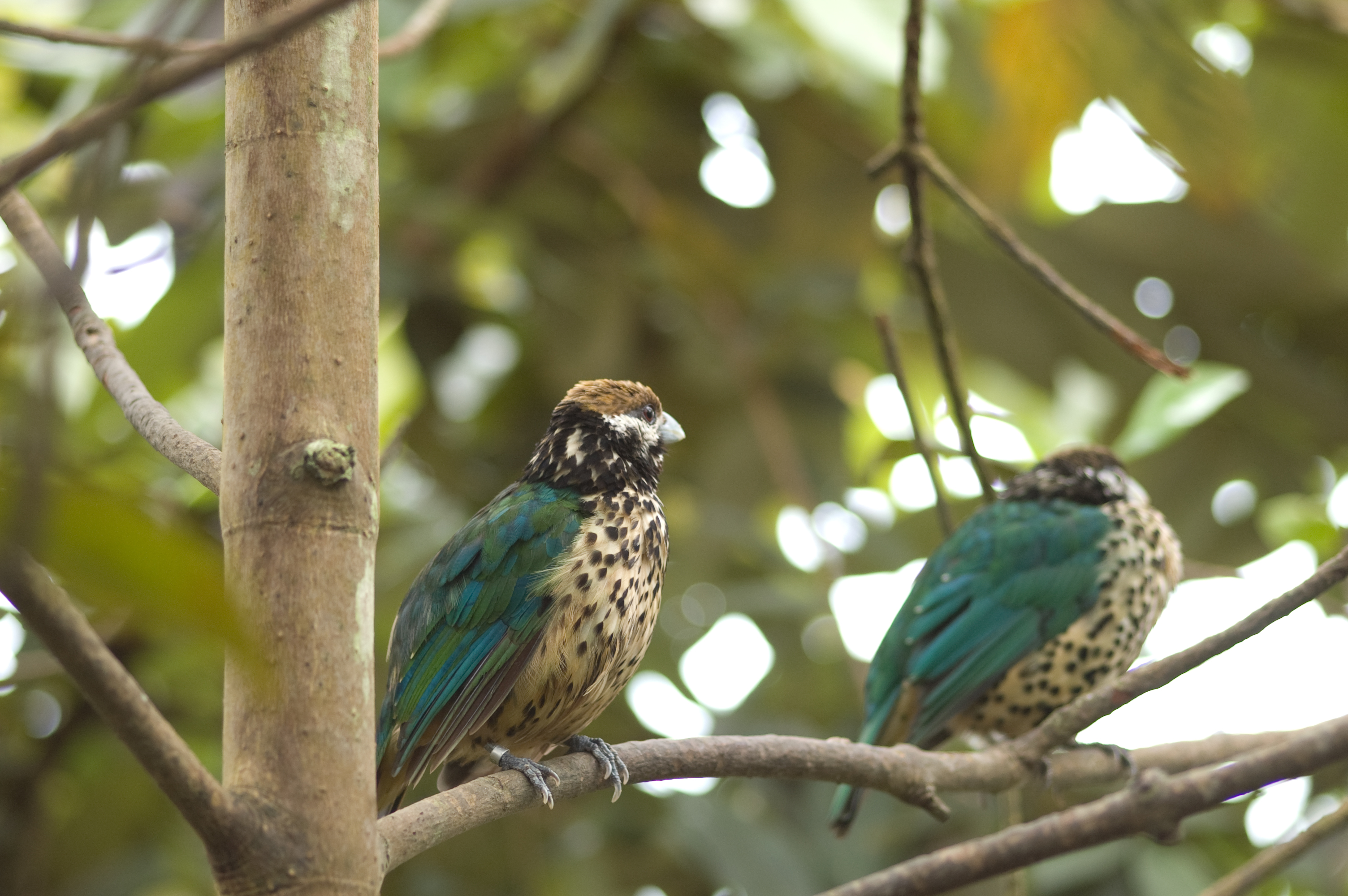 Witoorkatvogel